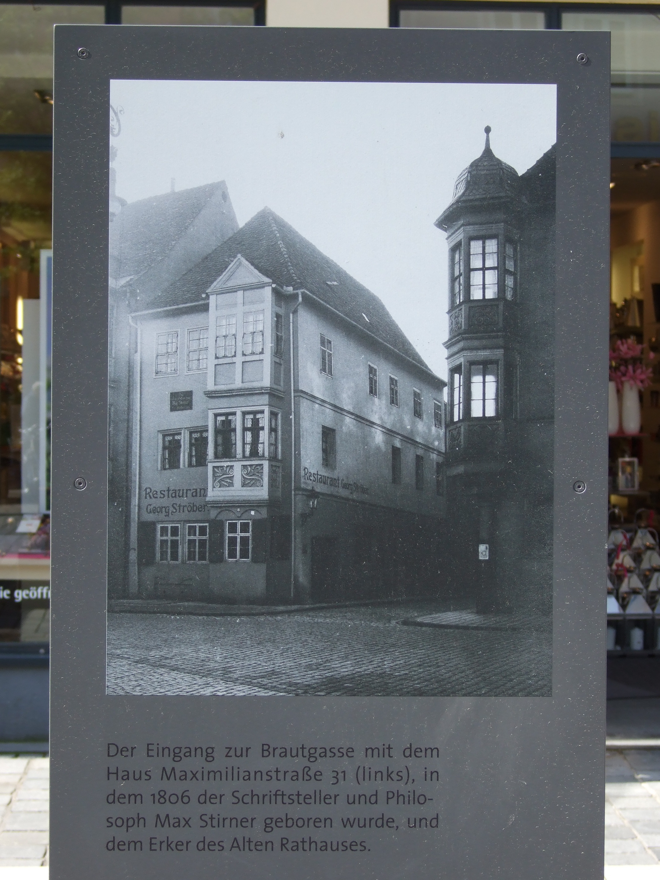 Infostele Stirnerhaus Bayreuth